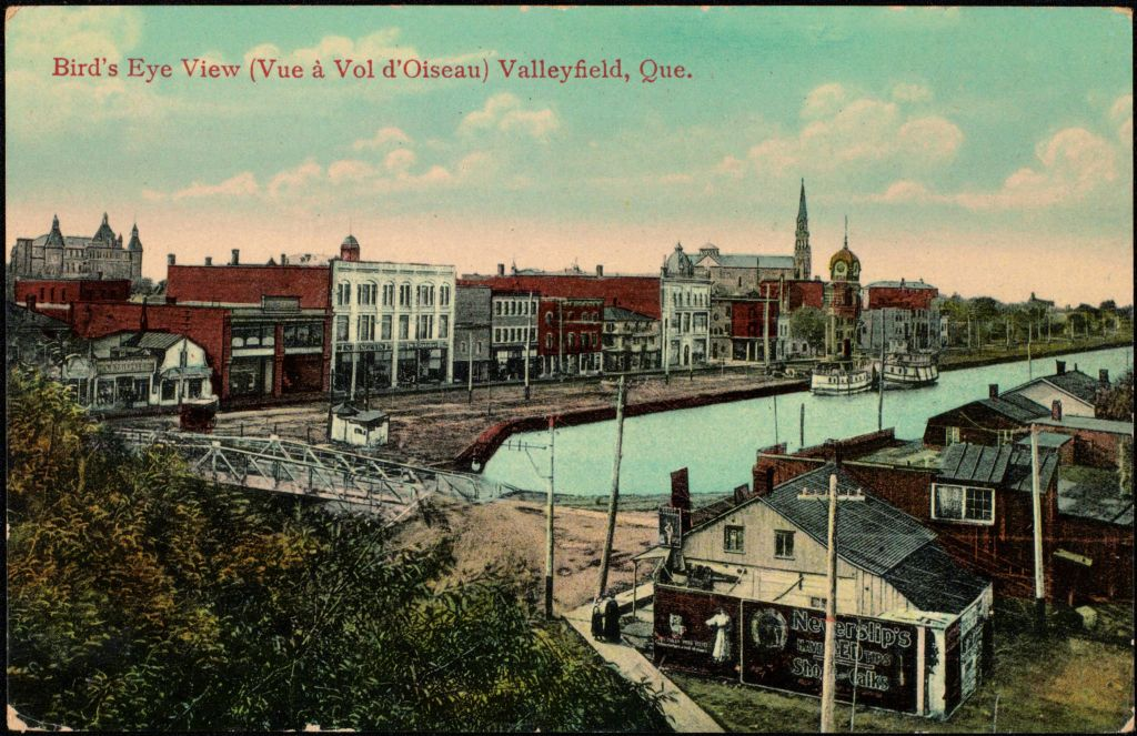 Bird's eye view, Valleyfield, Que., carte postale, Solis & Leduc, Libraires-Éditeurs